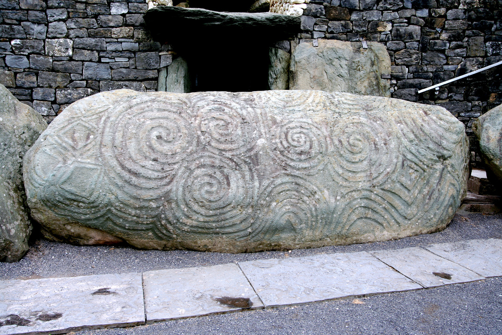 Stein mit Ornamenten am Eingang von Newgrange, Irland